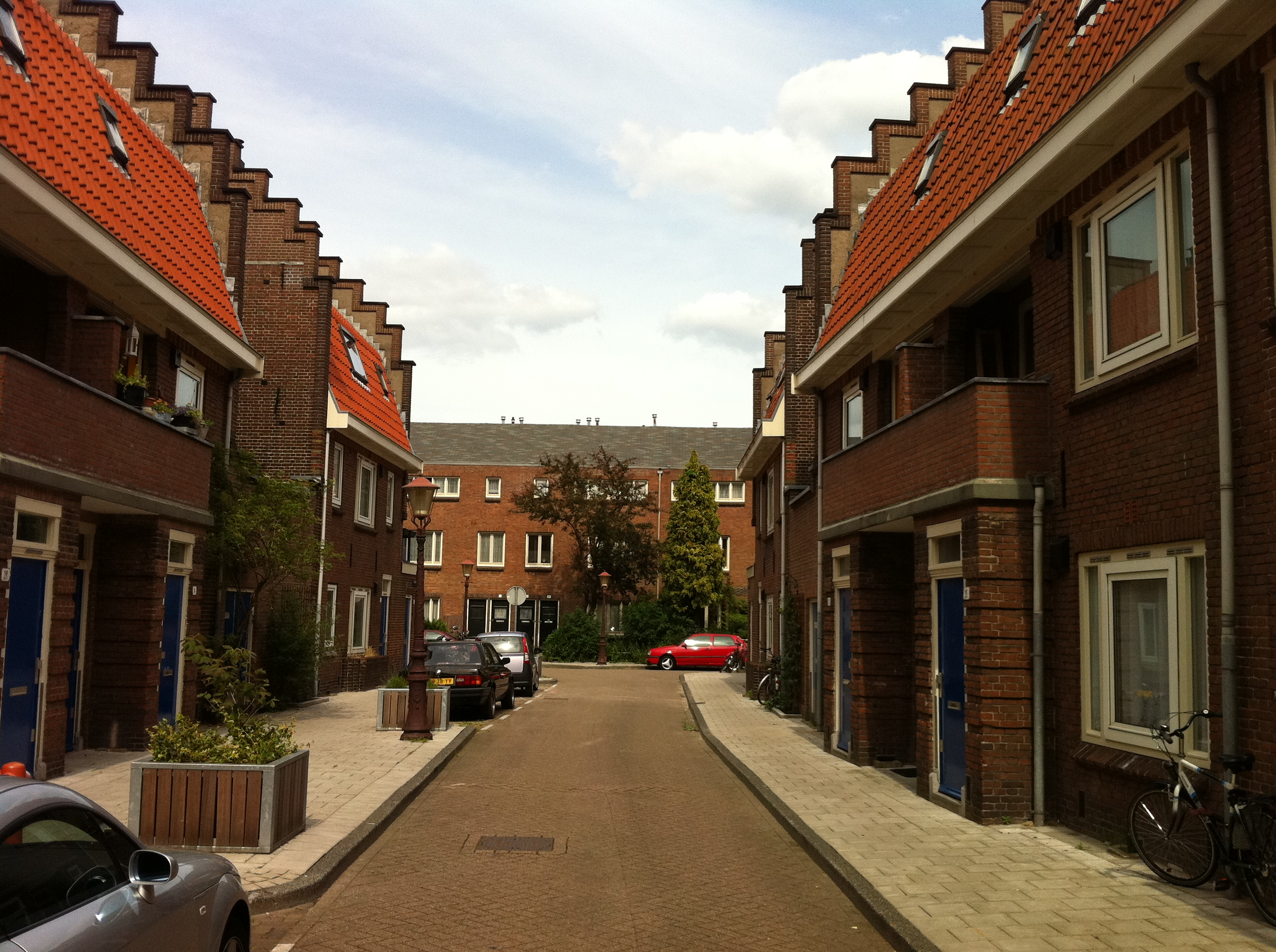 Colensostraat gemeentewoningen Transvaalbuurt Amsterdam